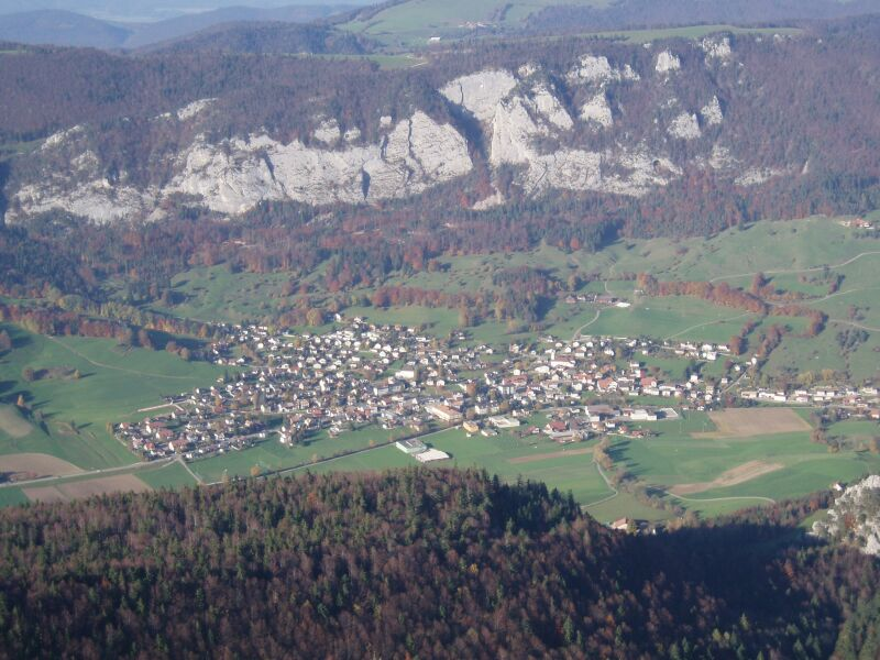 Blick von der Röti auf Welschenrohr und die Fluh (Kanton Solothurn, Schweiz).